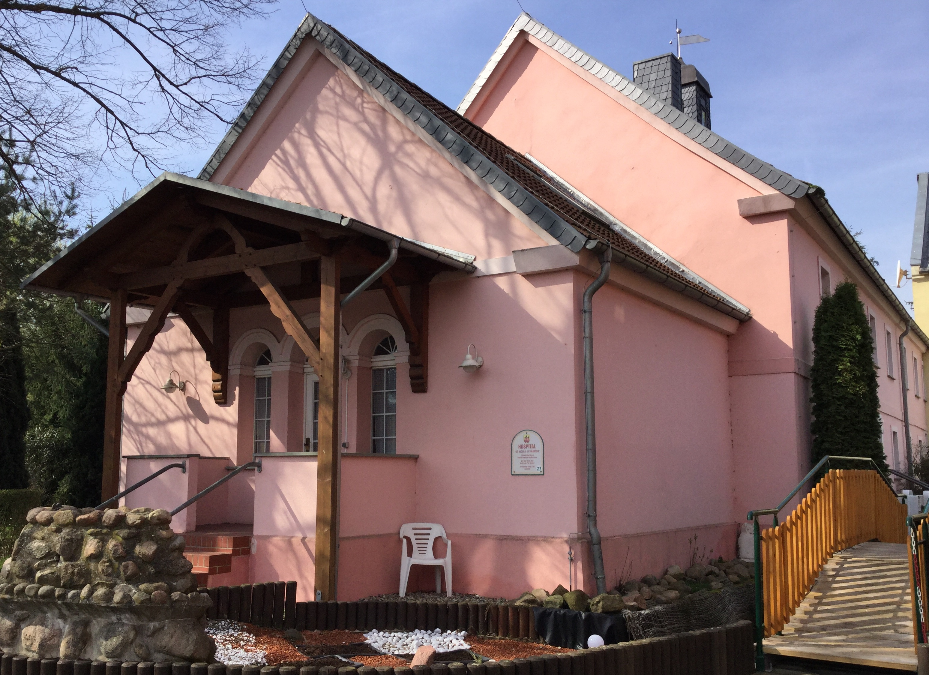 Hospital Möckern